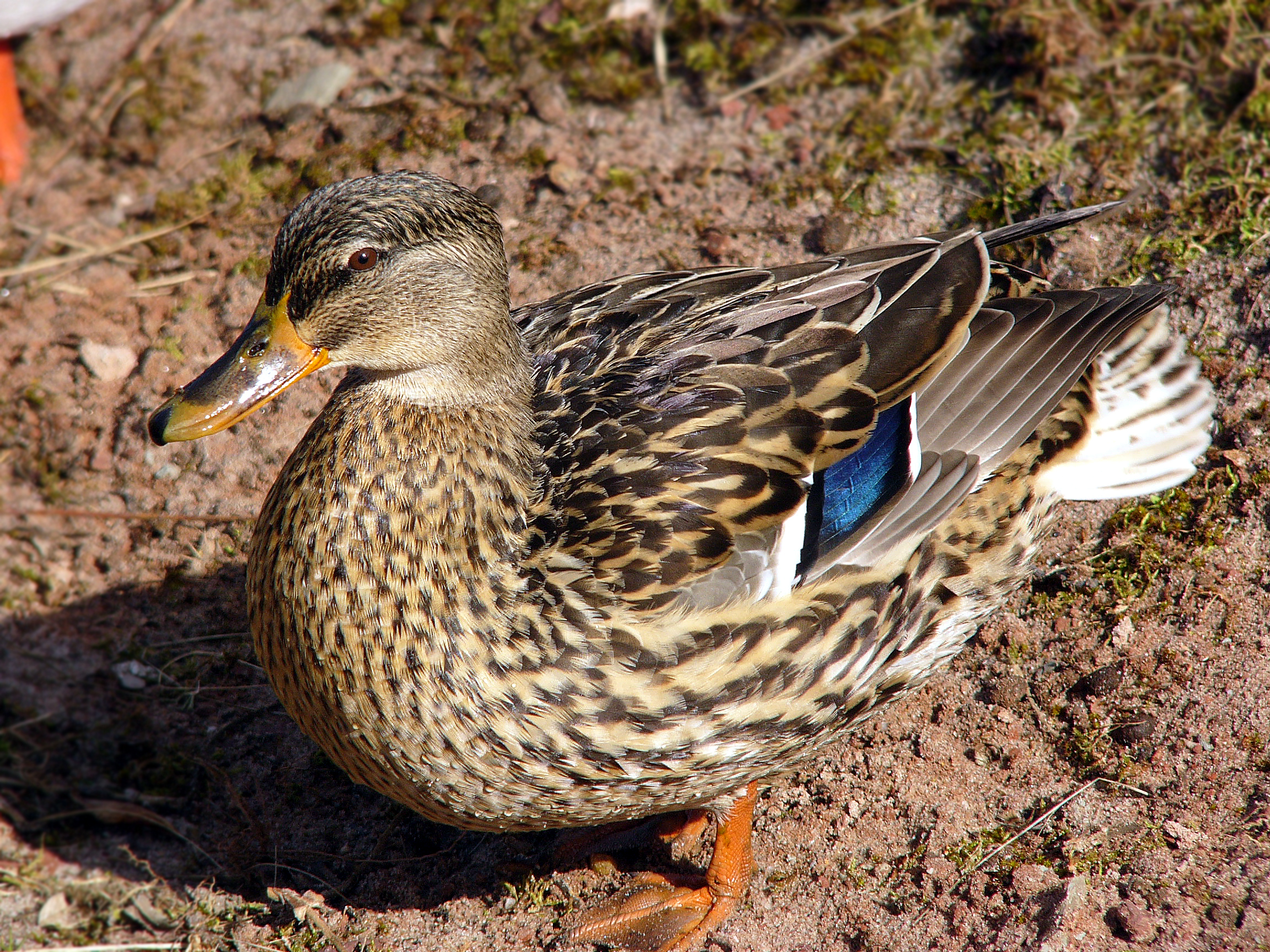 Anas platyrhynchos female (Helgoland/Düne)